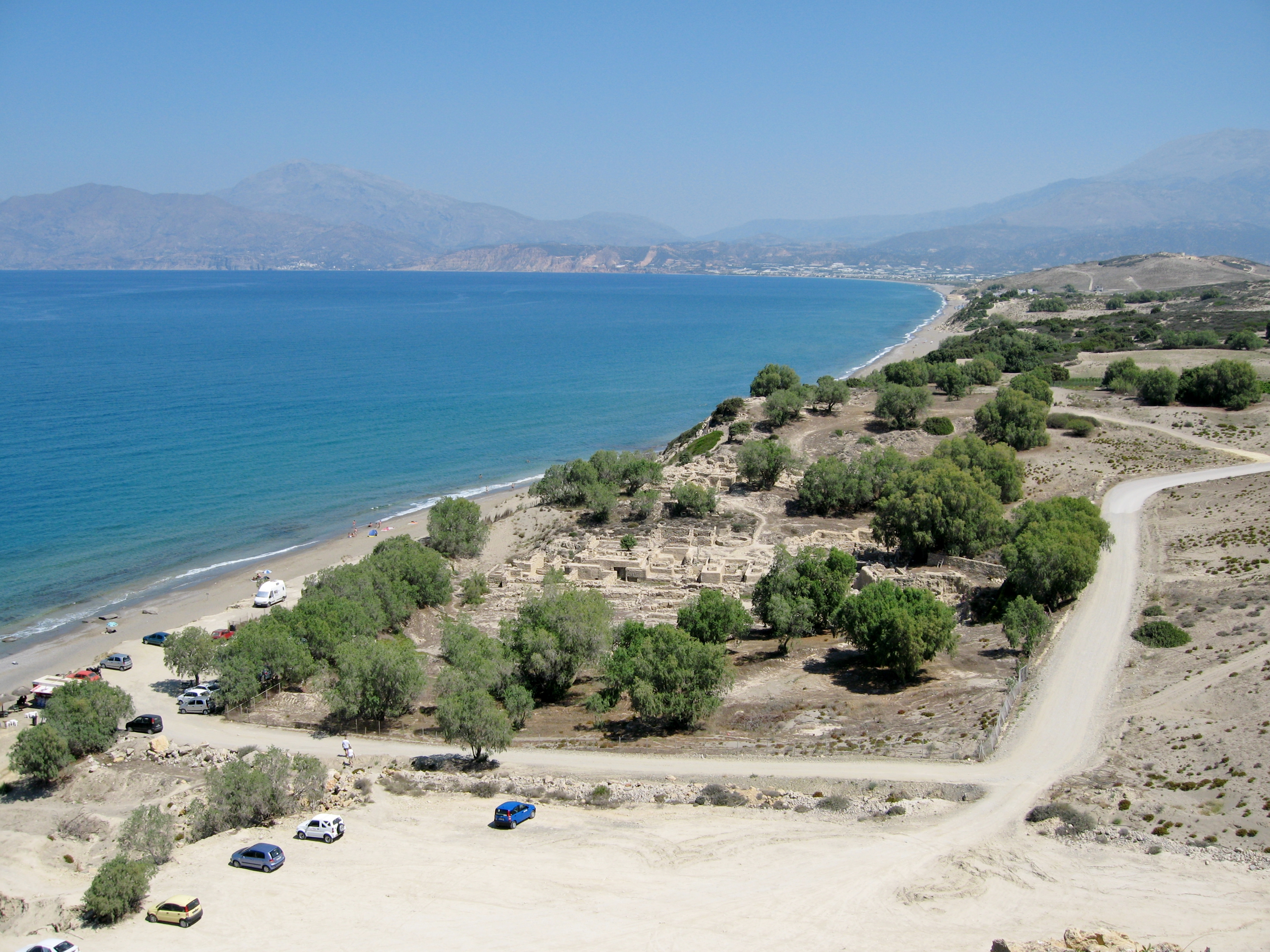 Komos, Nomos Iraklio, Crete, Greece